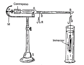 Balanza de Mohr-Westphal. Esquemática.